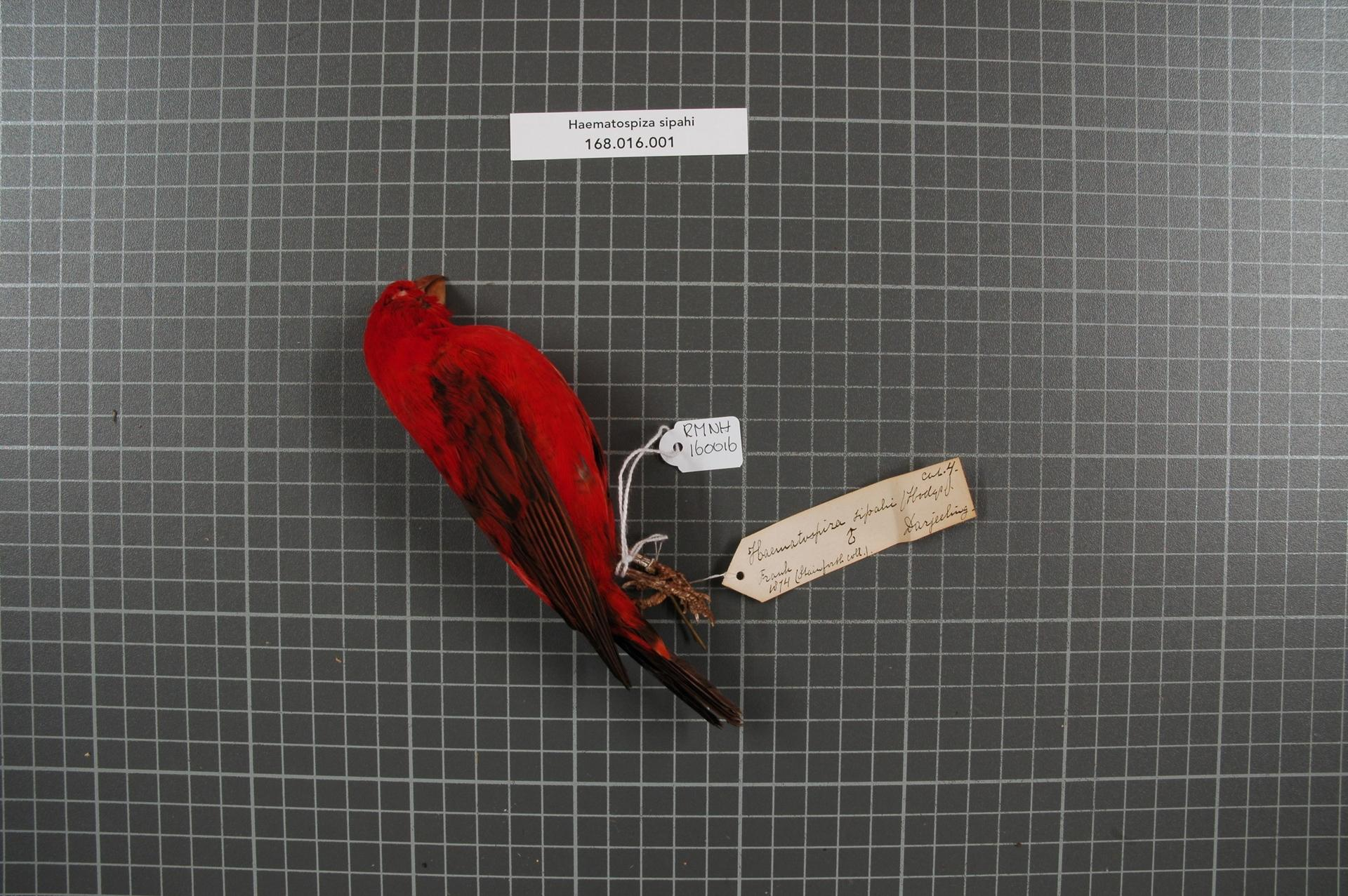 Haematospiza sipahi (Hodgson, 1836)